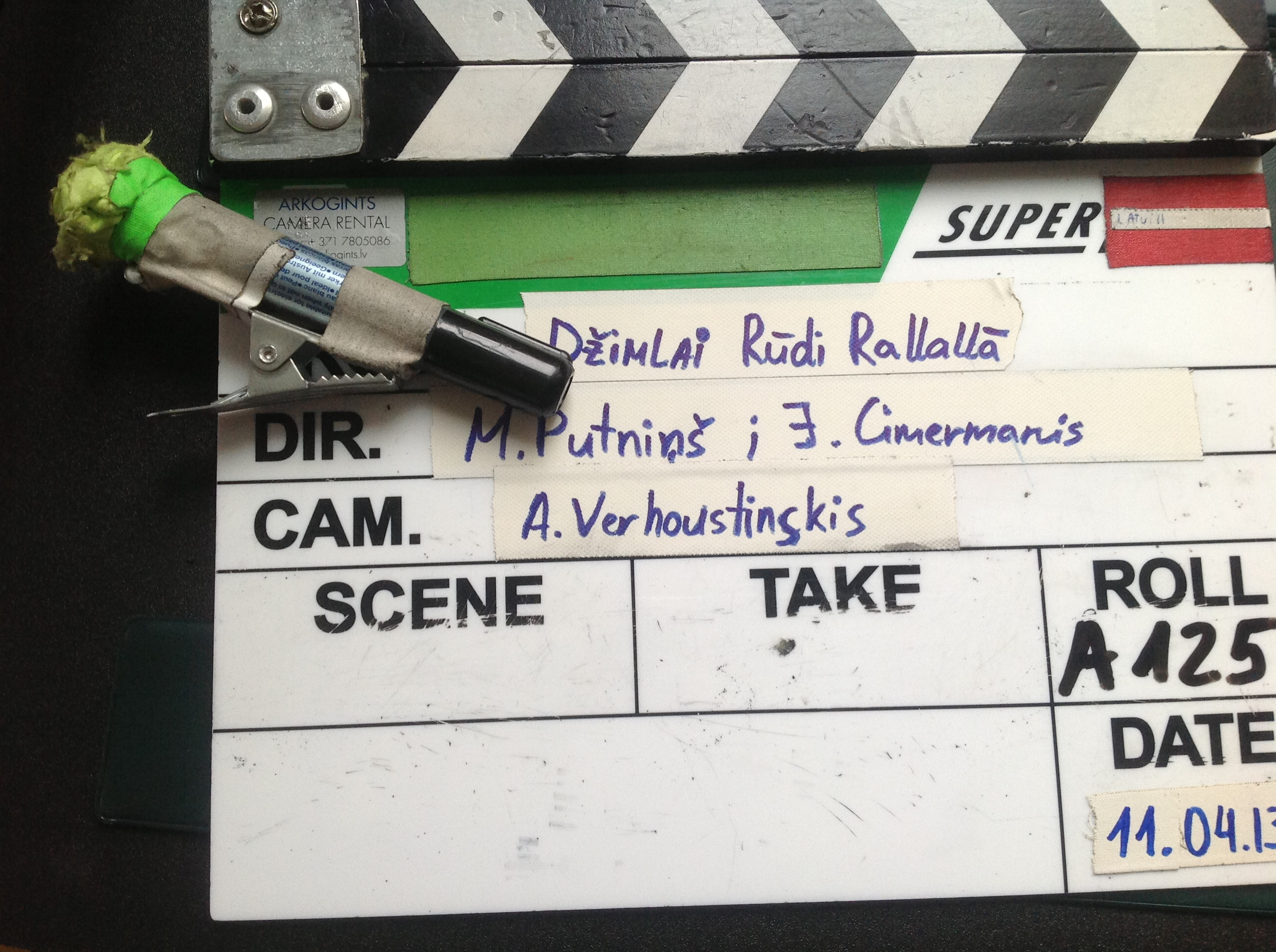 Filmas "Džimlai rūdi rallallā" uzņemšana Ministru kabinetā